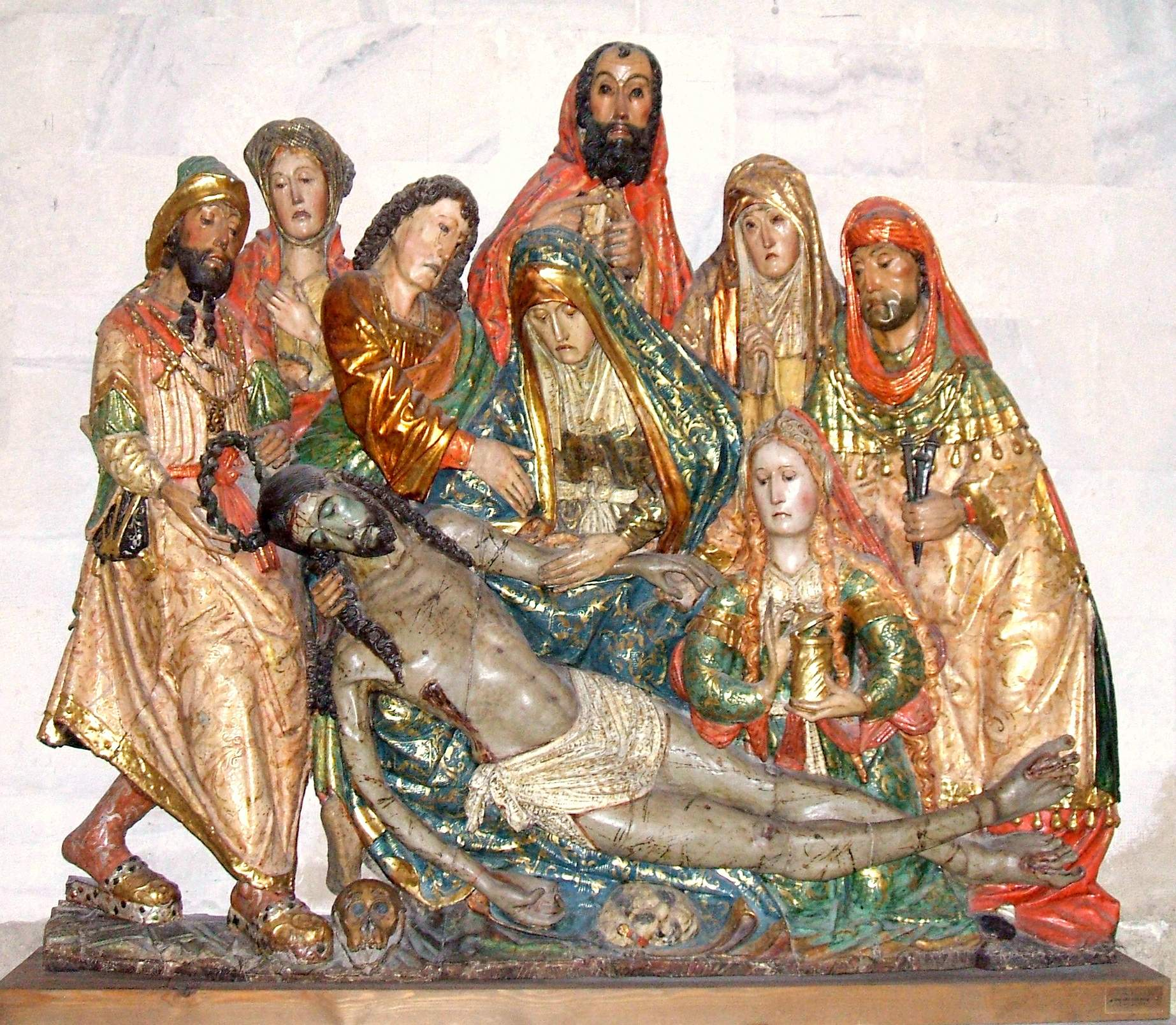 Museo Diocesano y Catedralicio de Valladold, Llanto sobre Cristo Muerto